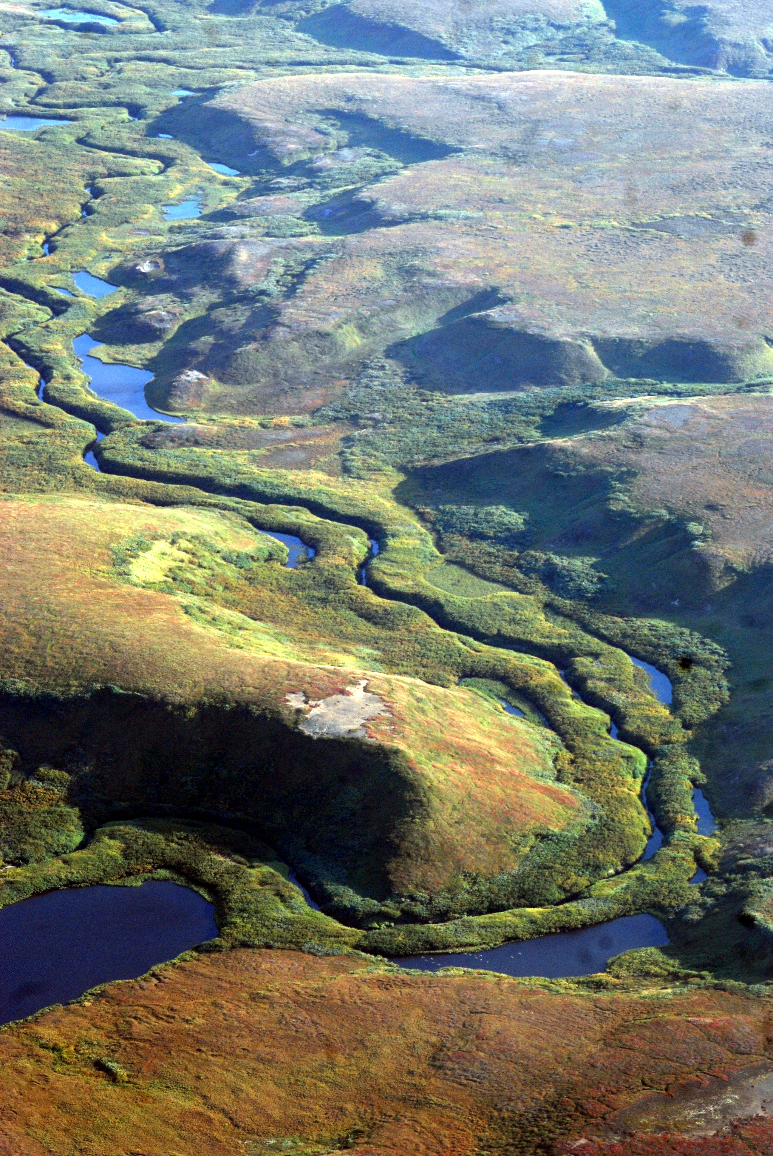 Тундра в сентябре